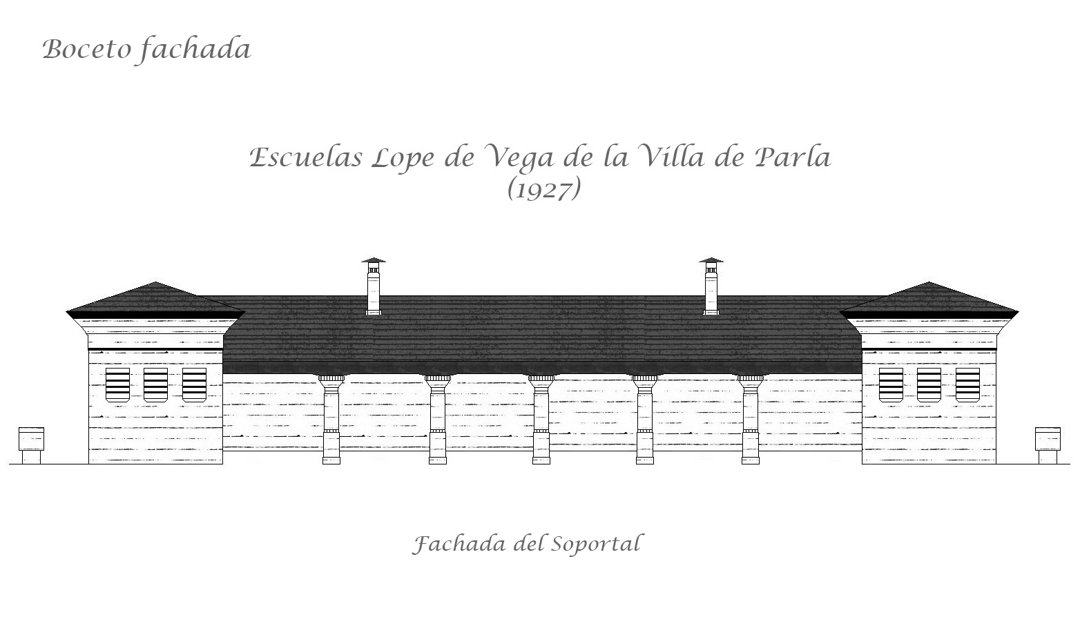 Boceto del edificios de las antiguas escuelas Lope de Vega en Parla